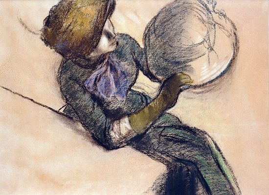 Chez la modiste, study